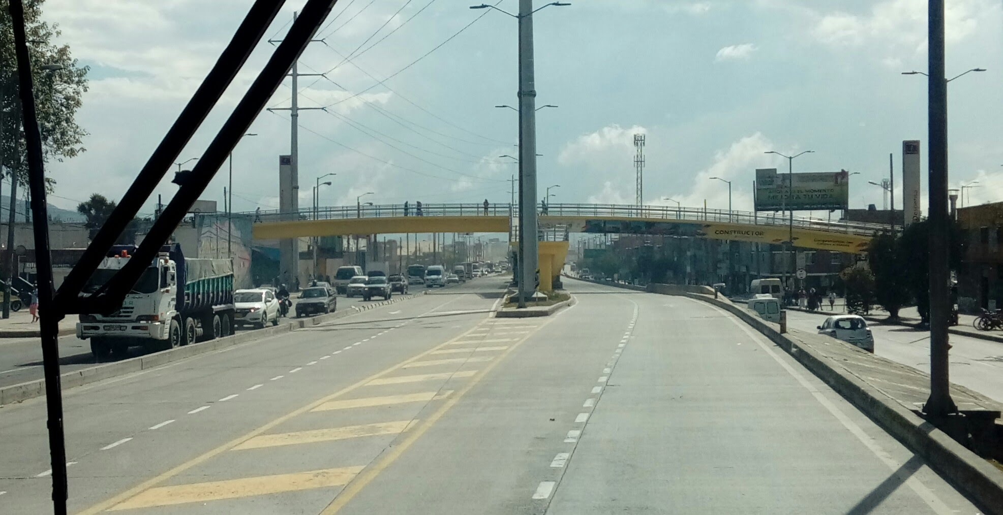 Puente peatonal La Despensa, situado en la Autopista Sur.